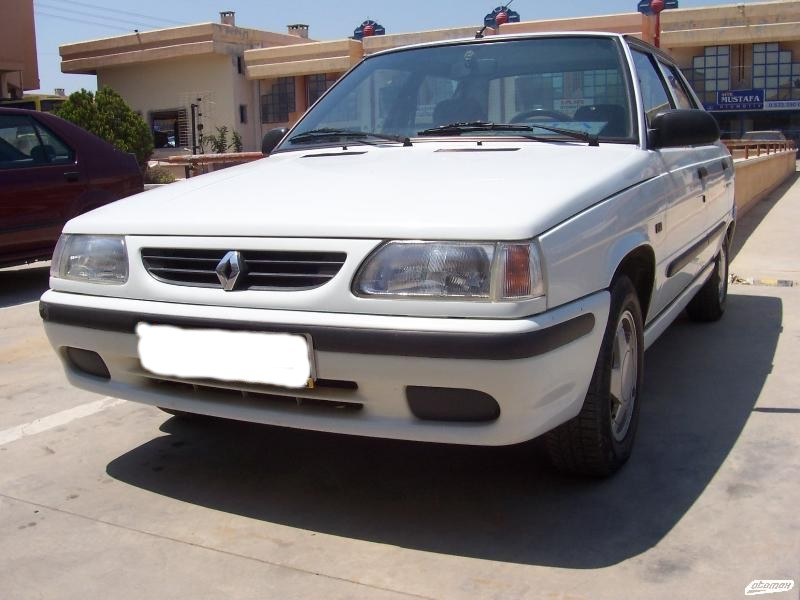 El R9 versión producida hasta el año 2000.